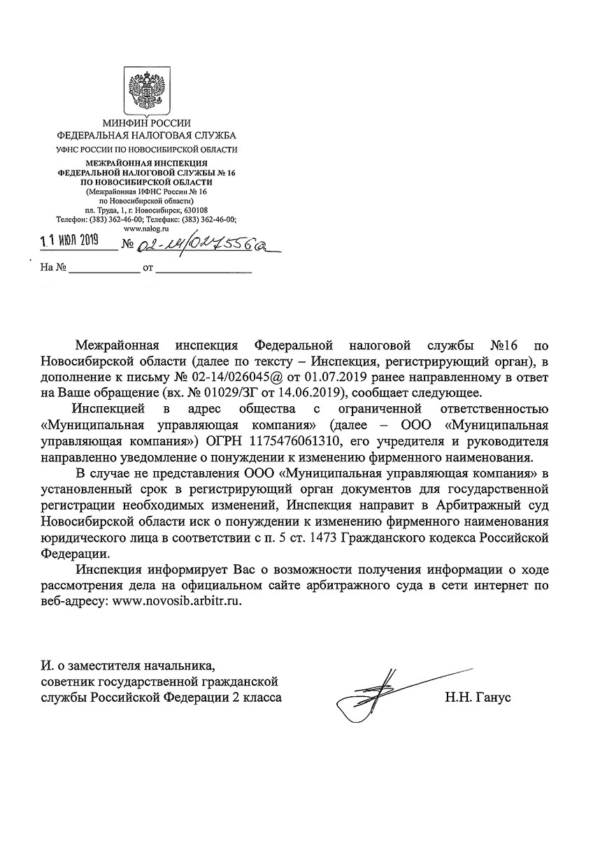 Федеральная налоговая служба (ФНС России) по Новосибирской области информирует о мерах понуждению к изменению фирменного названия частной компании, исключением из её названия "муниципальная". ООО Муниципальная управляющая компания - частная компания, без участия в ней органов местного самоуправления. Не законное использование в своём наименовании "муниципальная".